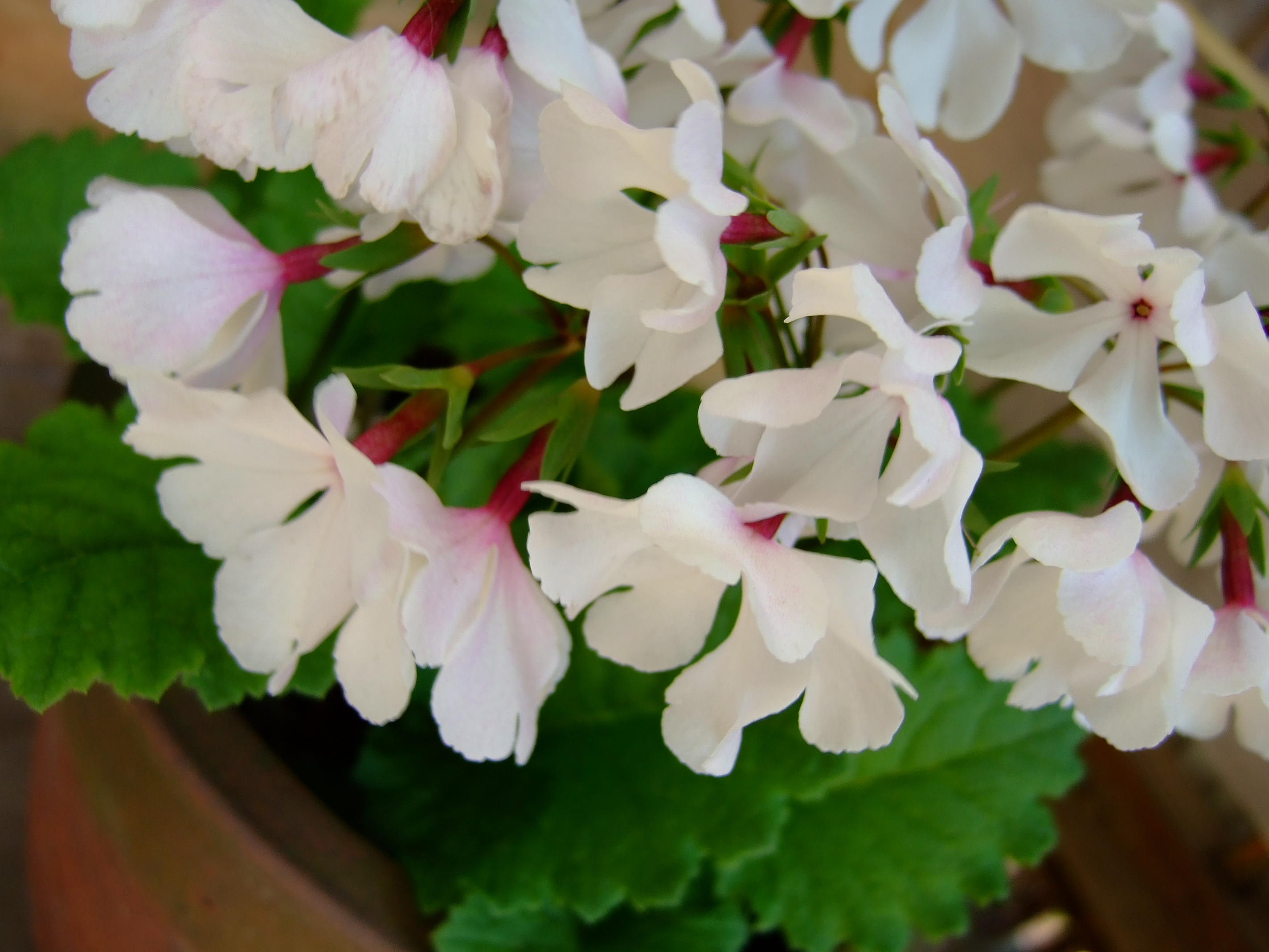 兵庫県立フラワーセンター サクラソウ